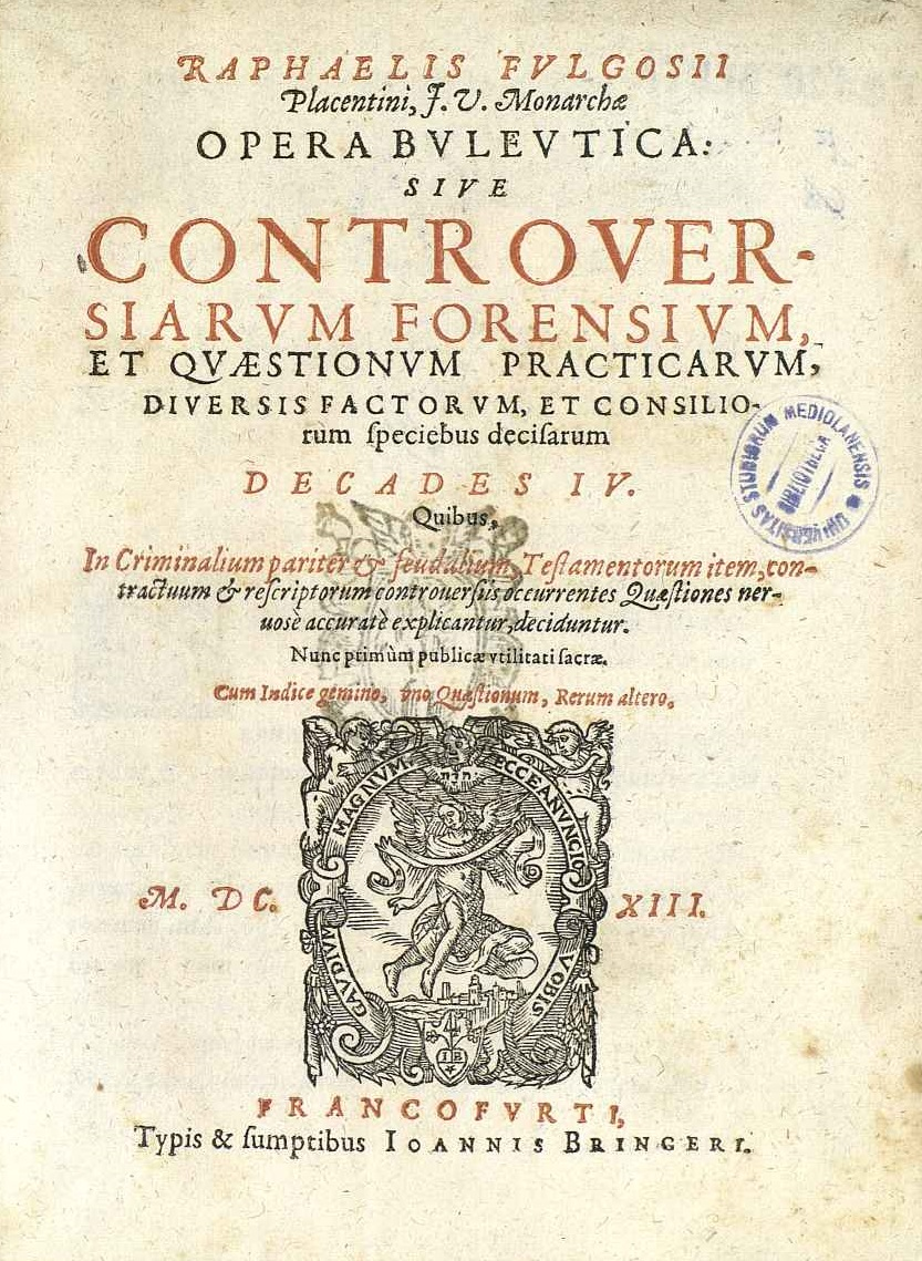 Frontespizio